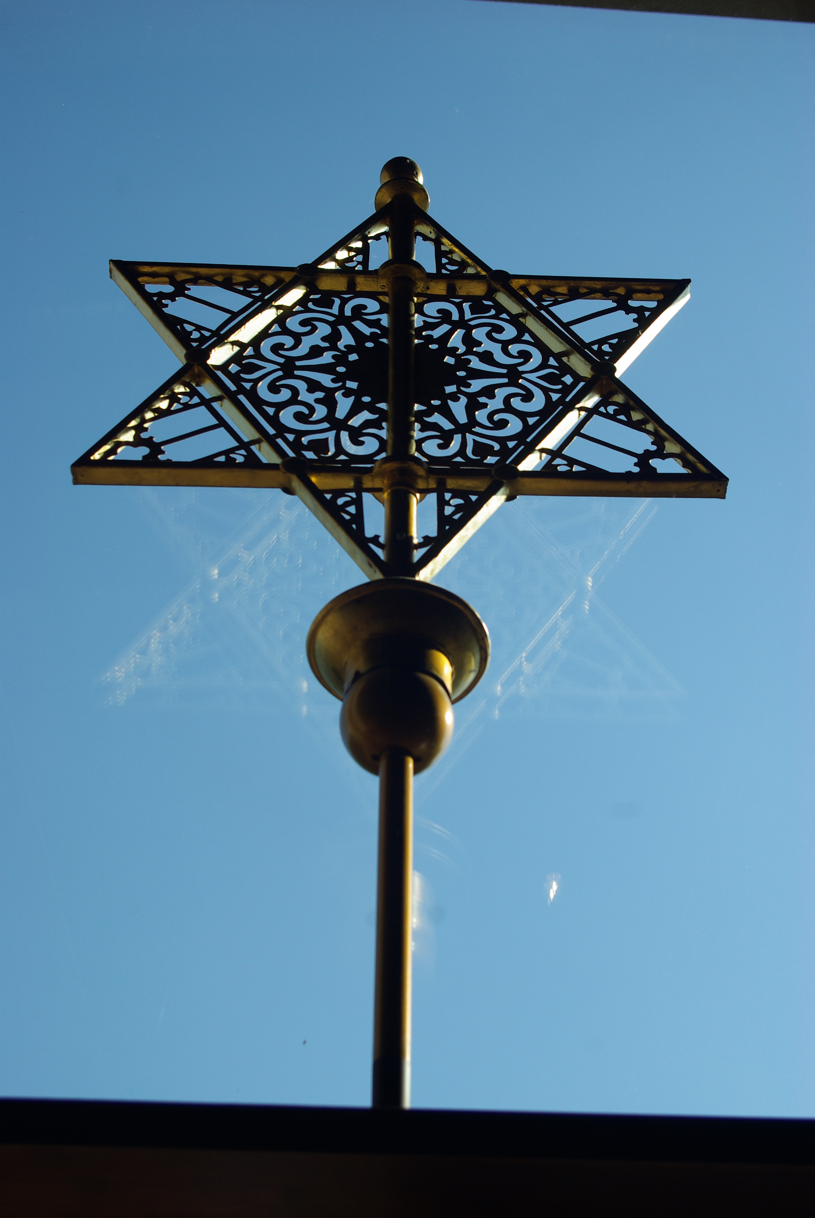 Geretter Davidstern der alten Synagoge Dresden im Eingangsbereich der Neuen Synagoge